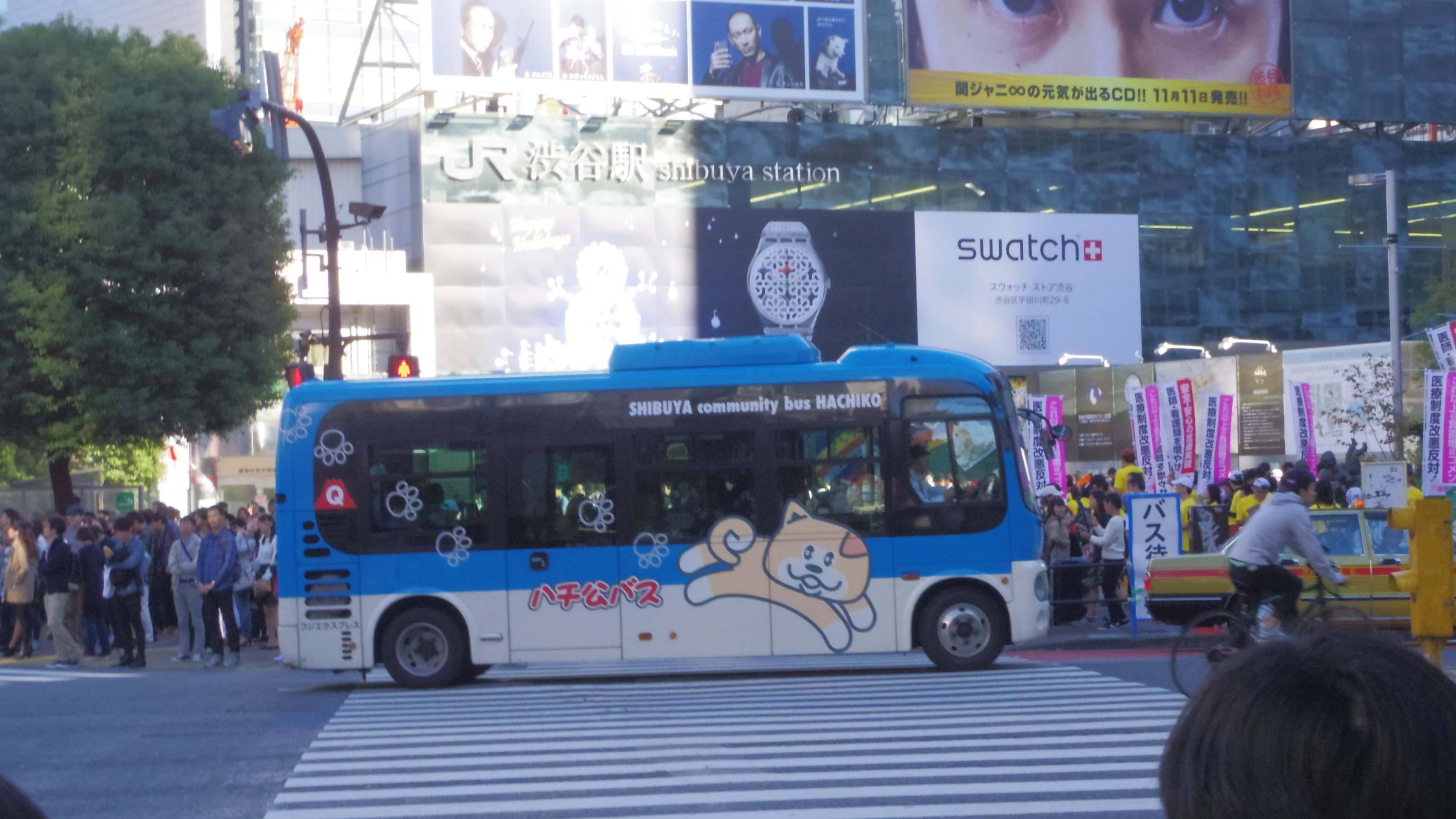 渋谷区のコミュニティバス、ハチ公バス。これはフジエクスプレスのもの。2015年11月3日、渋谷駅前にて撮影。